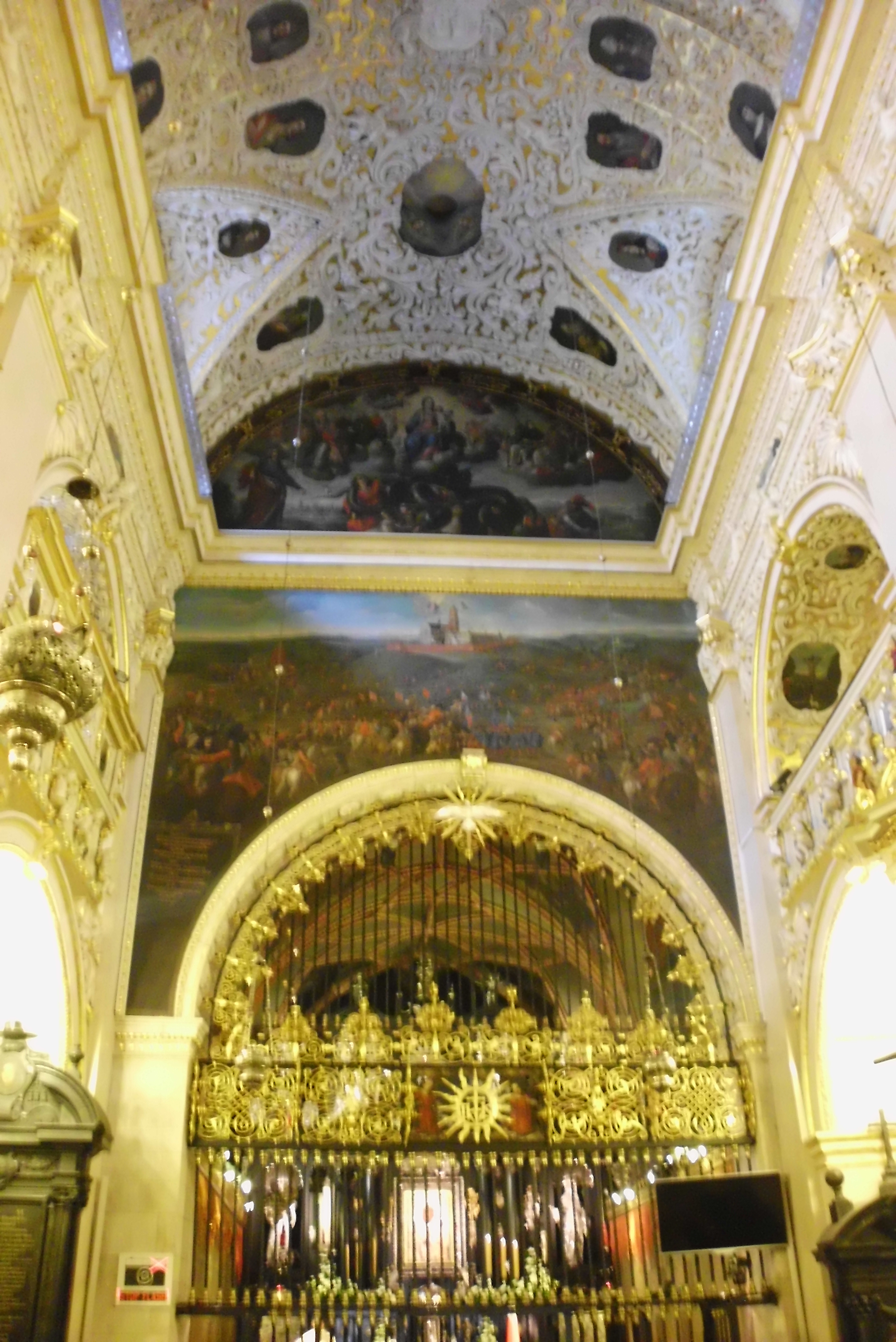 Wnętrze kaplicy Cudownego Obrazu Matki Boskiej Częstochowskiej, Jasna Góra - marzec 2015